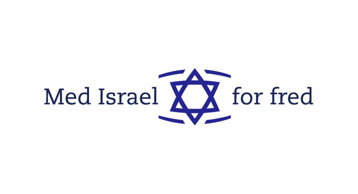 MIFFs offisielle logo.